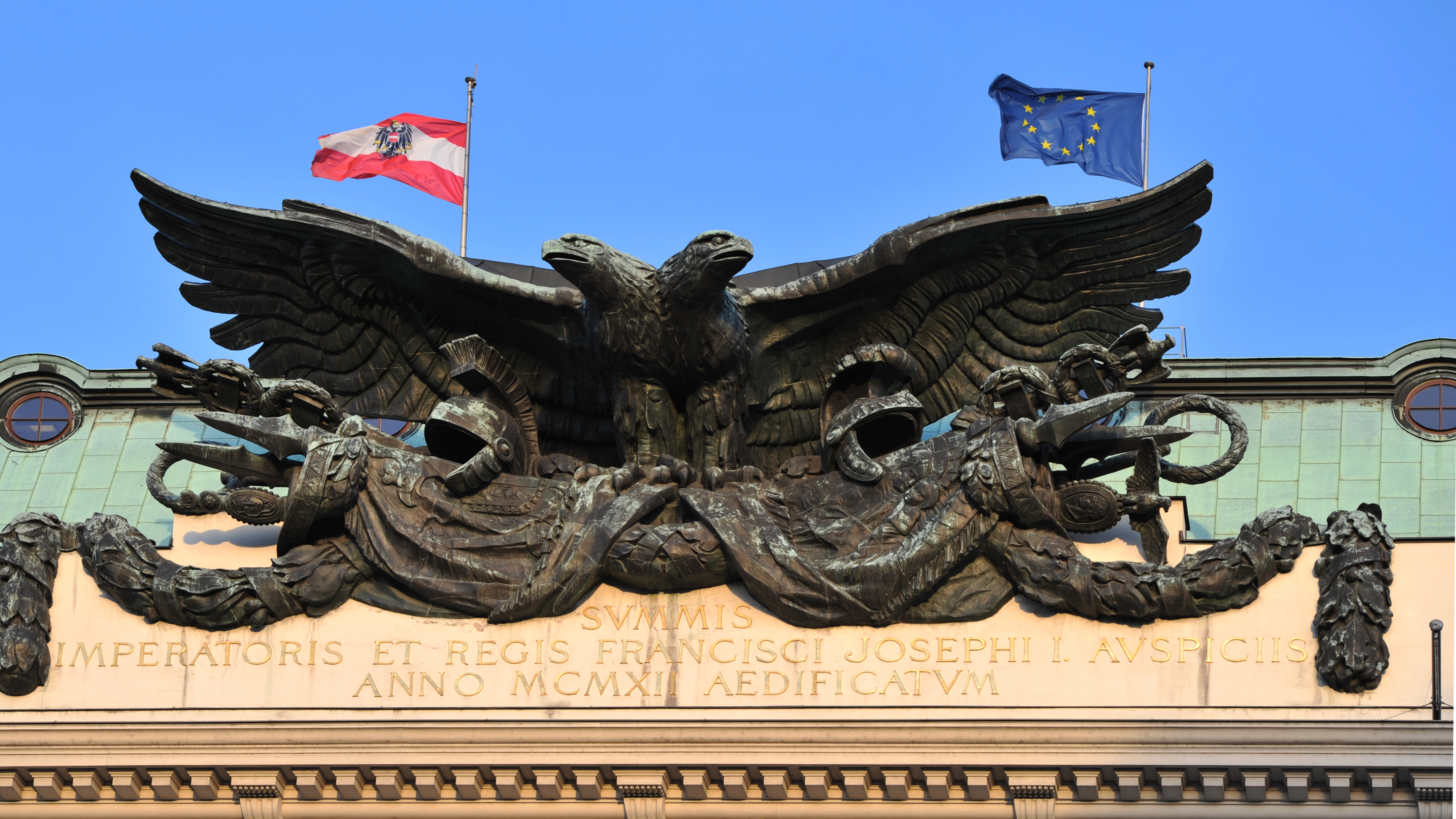 Ehem. Kriegsministerium, Regierungsgebäude